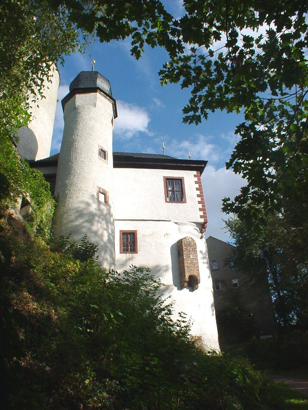 eigenes Foto von 2003, public domain, Burg Posterstein